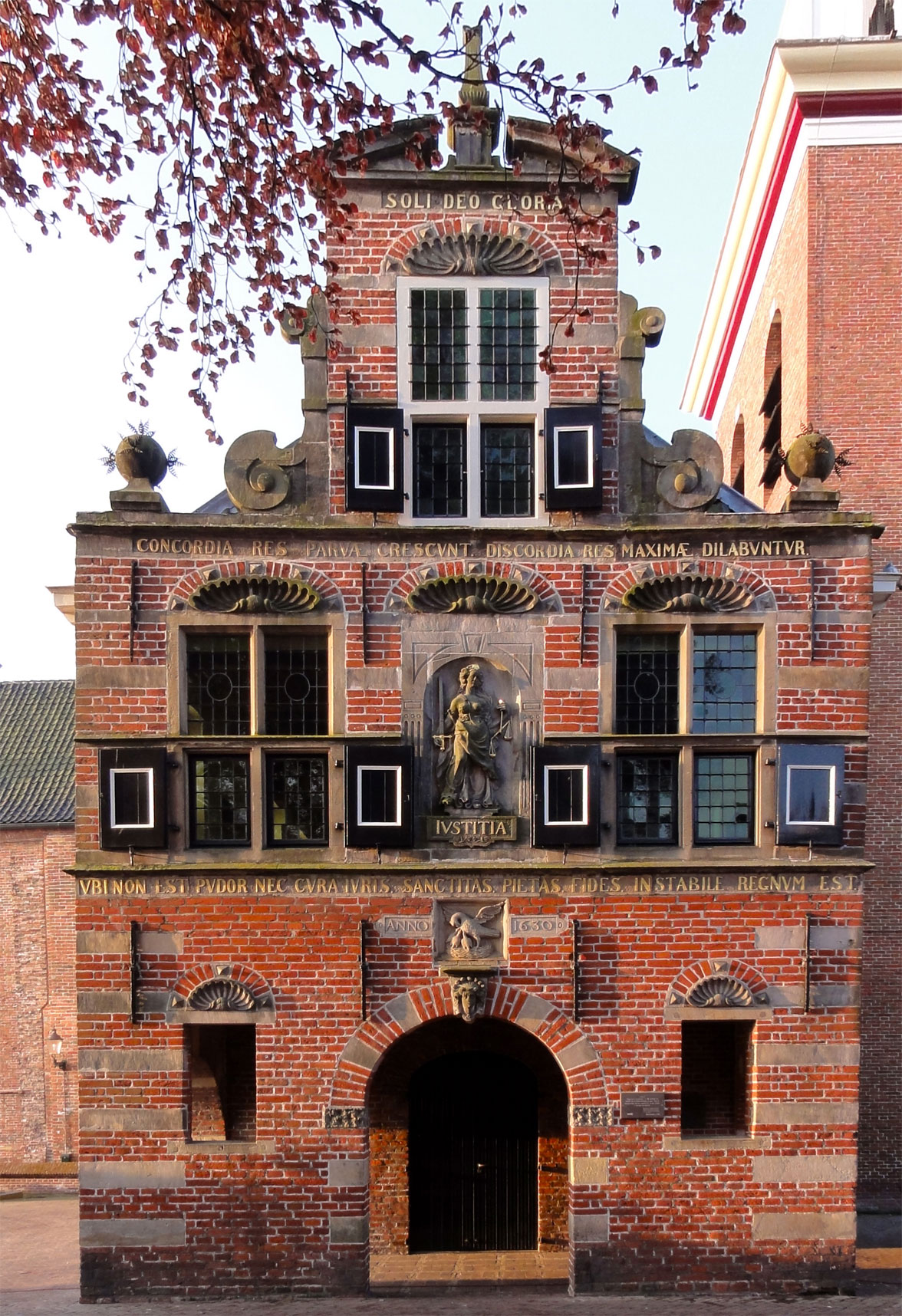 Raadhuis in Appingedam